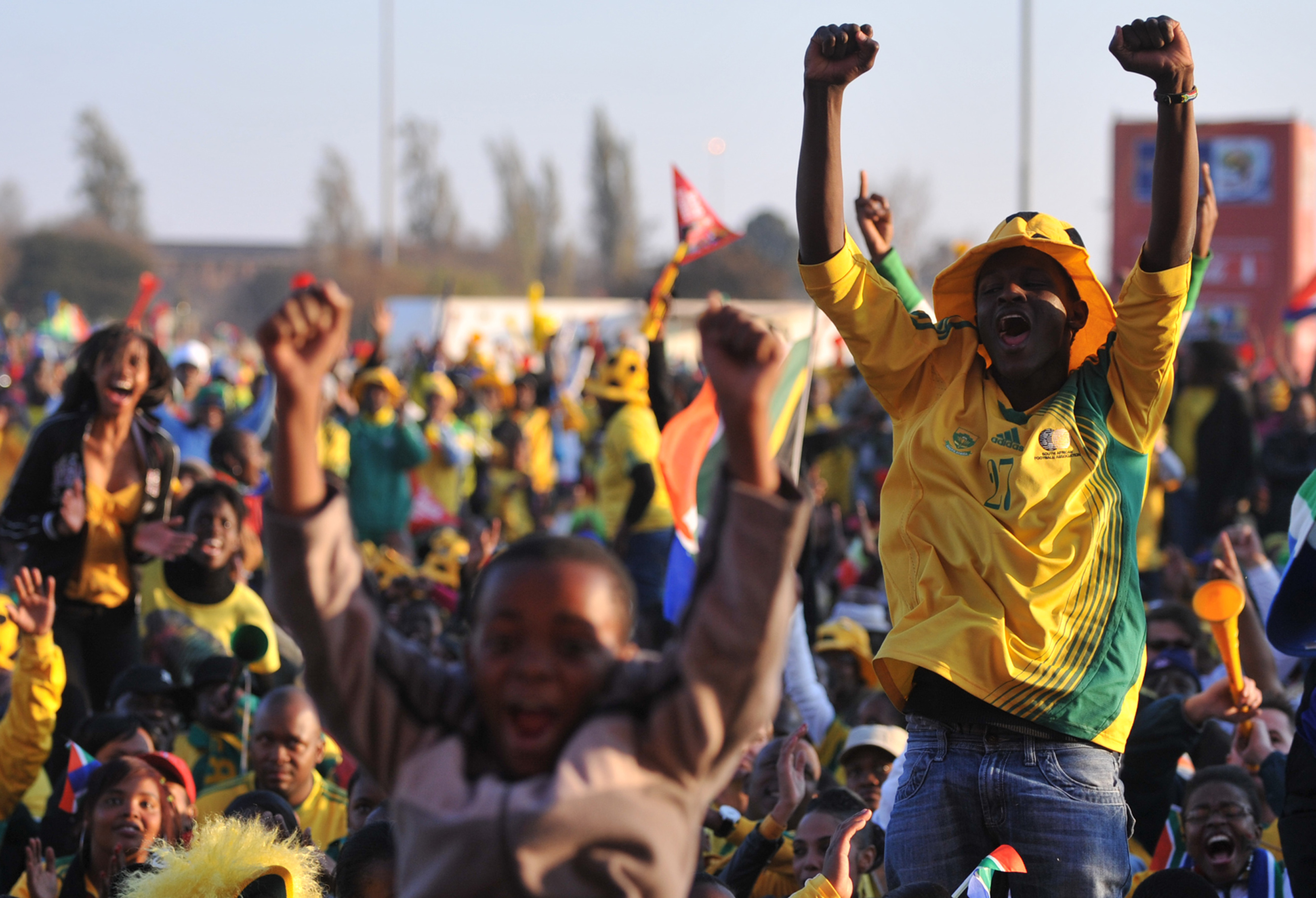 Joanesburgo - Torcedores do Bafana Bafana, como é conhecida a seleção da África do Sul, assistem ao jogo de abertura da Copa do Mundo, em telão montado pela Fifa no bairro de Soweto.